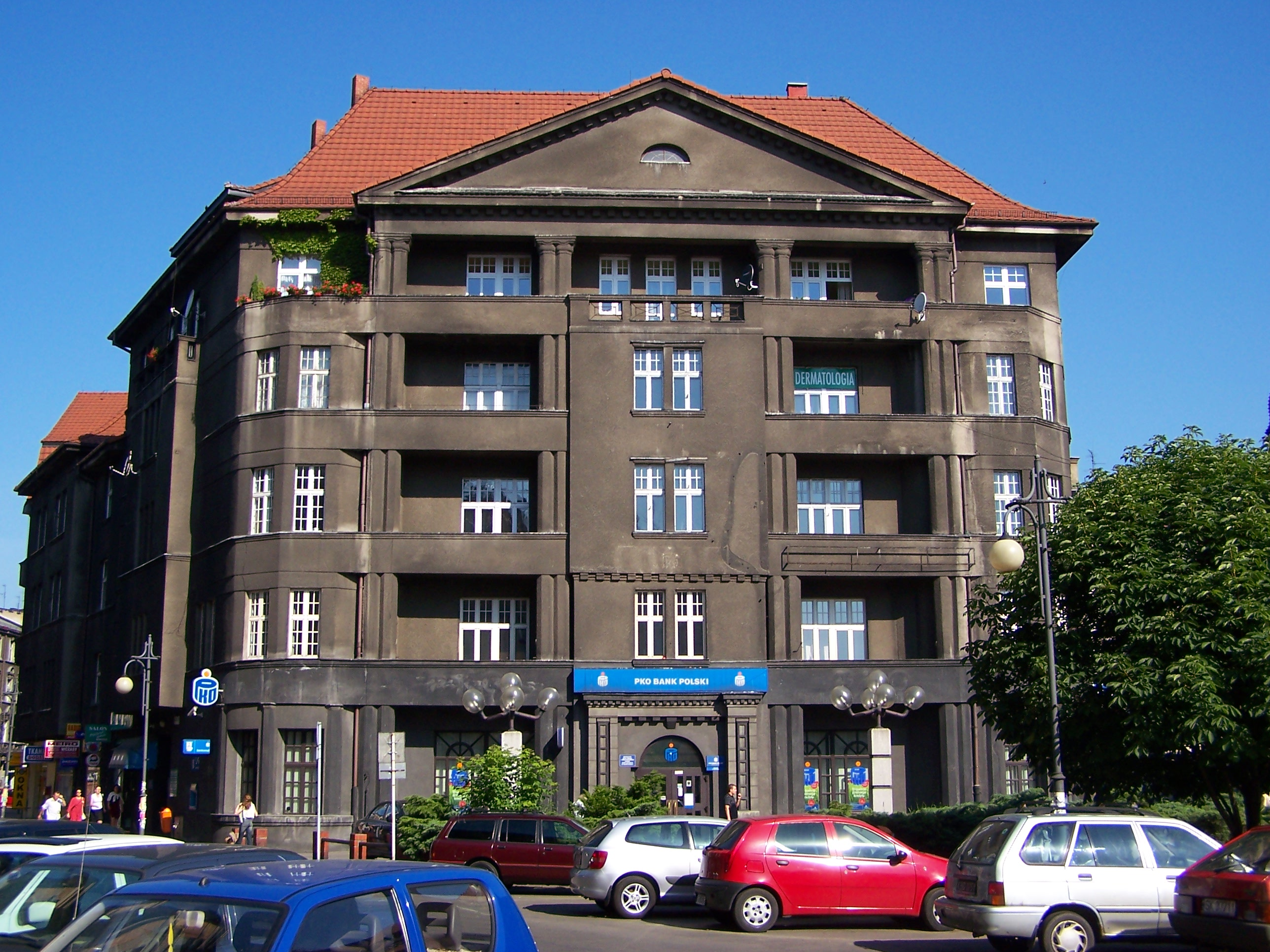 Kamienica na rogu ulic Mickiewicza (po prawej) i Chopina (po lewej) w Katowicach.